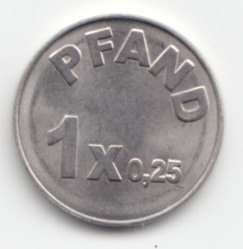 Münzähnlicher Chip zum Beweis des Kaufs einer Wegwerfverpackung in einem Laden - hier Norma - um den eingeführten Dosenpfand zu Anfangszeiten wiederzubekommen